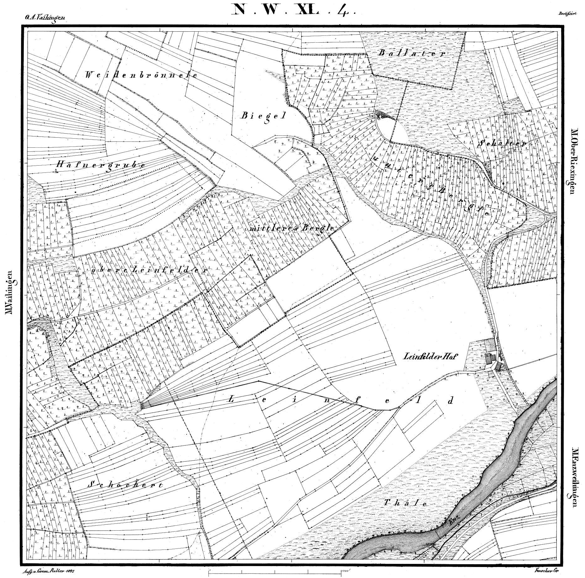 Leinfelder Hof auf der württembergischen Urflurkarte (1832), Planquadrat XL, 4, Maßstab 1:2500. Heute auf Enzweihinger Markung (Vaihingen/Enz)